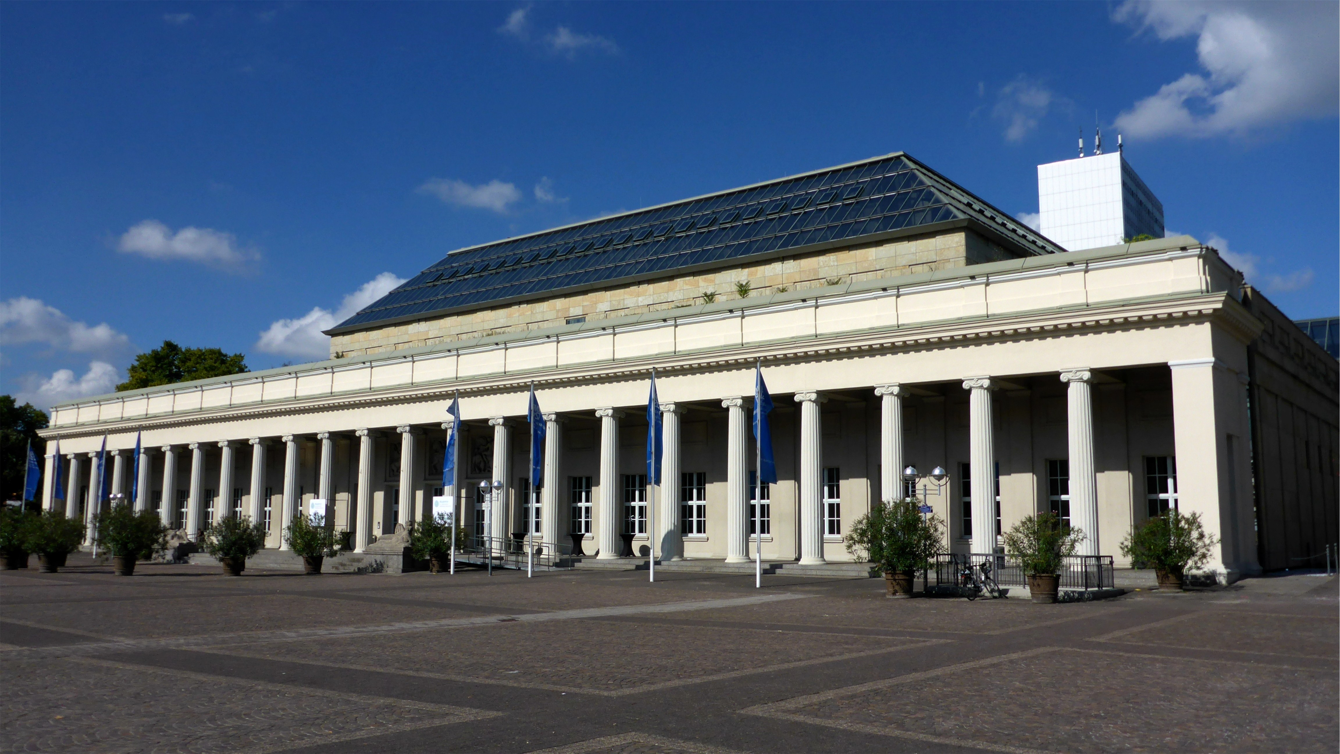 Die Stadthalle auf dem Festplatz in Karlsruhe